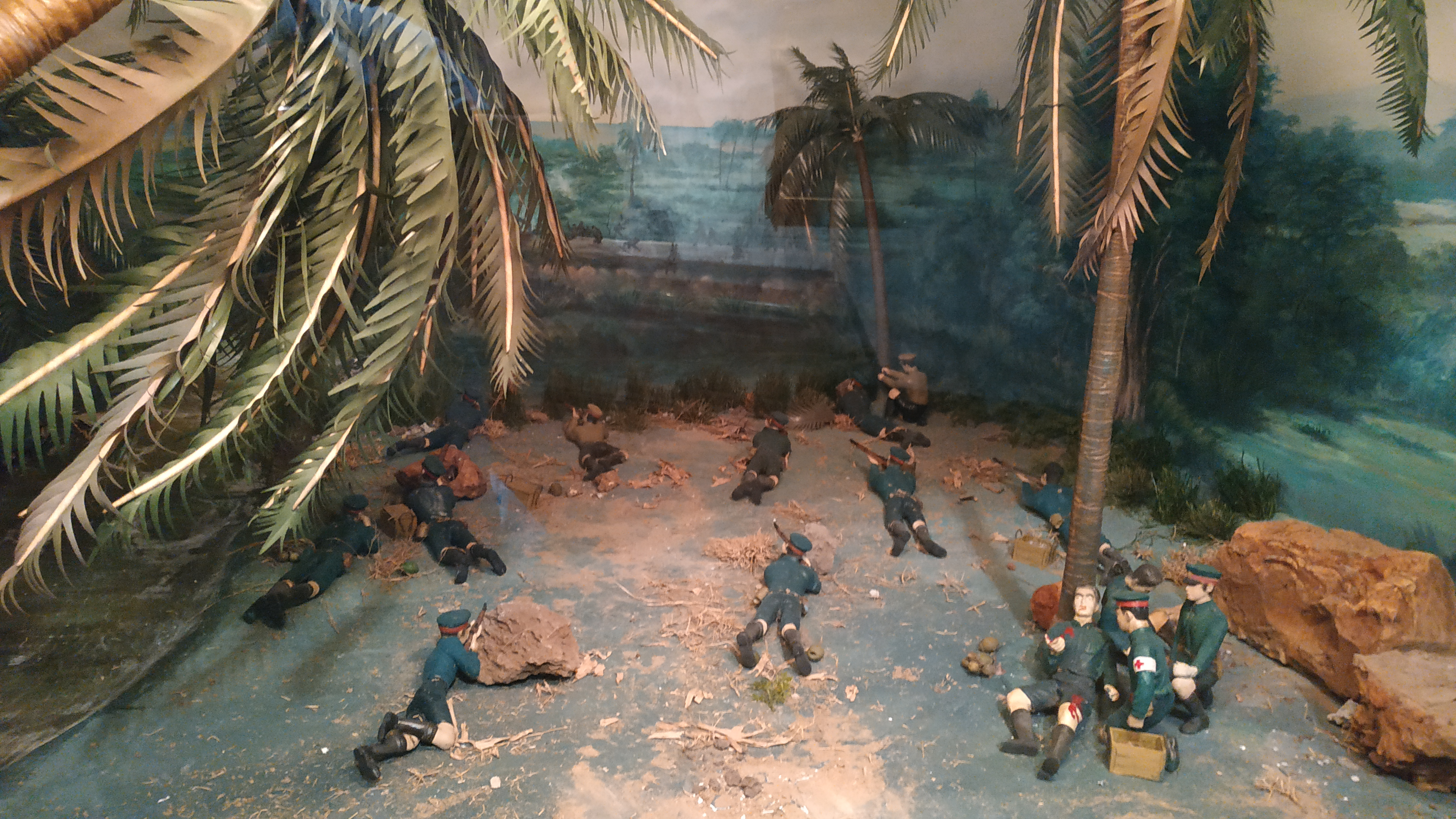 ฉากจำลองเหตุการณ์การรบของยุวชนทหารและตำรวจสนามที่เชิงสะพานท่านางสังข์ จัดแสดงอยู่ที่ชั้น 3 อาคารอนุสรณ์สถานแห่งชาติ ตำบลคูคต อำเภอลำลูกกา จังหวัดปทุมธานี การรบที่สะพานท่านางสังข์เป็นส่วนหนึ่งของเหตุการณ์กองทัพญี่ปุ่นบุกประเทศไทยในช่วงสงครามโลกครั้งที่ 2 โดยเหตุการณ์เกิดขึ้นในพื้นที่เชิงสะพานท่านางสังข์ อำเภอเมืองชุมพร จังหวัดชุมพร เมื่อเวลาเช้าของวันที่ 8 ธันวาคม พ.ศ. 2484 ซึ่งเป็นวันที่กองทัพจักรวรรดิญี่ปุ่นปฏิบัติยกพลขึ้นบกตามหัวเมืองชายฝั่งทะเลจังหวัดต่างๆ ของไทย โดยดำเนินการไปพร้อมกันกับปฏิบัติการโจมตีอ่าวเพิร์ลในรัฐฮาวาย ประเทศสหรัฐอเมริกา (ยังคงเป็นวันที่ 7 ธันวาคม ค.ศ. 1941 ในพื้นที่ฝั่งมหาสมุทรแปซิฟิก) ในมุมขวาล่างของฉากจำลองเหตุการณ์ดังกล่า จะเห็นสิบเอกนยำราญ ควรพันธ์ (ภายหลังได้รับพระราชทานเลื่อนยศเป็นนายทหารสัญญาบัตร ชั้นยศร้อยโท) ครูฝึกหน่วยยุวชนทหารที่ 52 โรงเรียนศรียาภัย จังหวัดชุมพร ทำหน้าที่บัญชาการหน่วยยุวชนทหารในการต่อสู้แทนร้อยเอกถวิล นิยมเสน (ภายหลังได้รับพระราชทานเลื่อนยศเป็นพันโท) ผู้บังคับหน่วยฝึกยุวชนทหารที่ 52 ซึ่งเสียชีวิตระหว่างการรบ แม้ว่าตนเองจะบาดเจ็บ โดยมียุวชนทหารคอยช่วยปฐมพยาบาลอยู่ด้วย การรบได้ยุติลงในช่วงเวลาประมาณเที่ยงวันของวันเดียวกัน เนื่องจากรัฐบาลไทยได้ตัวสินใจยอมให้ญี่ปุ่นยกทัพผ่านประเทศไทยไปตีพท่าและมลายูของอังกฤษ เพื่อรักษาชีวิตของพลเมืองไทยไว้ เหตุการณ์ดังกล่าวจึงถือเป็นวีรกรรมครั้งสำคัญของยุวชนทหาร ที่ได้ปฏิบัติหน้าที่ป้องกันประเทศด้วยความกล้าหาญและความเสียสละ ภายหลังเมื่อมีการก่อตั้งนักศีกษาวิชาทหารเพื่อฝึกหัดวิชาทหารให้แก่เยาวชนแทนองค์กรยุวชนทหารซึ่งถูกยุบลงหลังสิ้นสงครามโลกครั้งที่ 2 จึงได้มีการกำหนดให้วันที่ 8 ธันวาคมของทุกปี เป็นวันนักศึกษาวิชาทหาร เพื่อรำลึกถึงวีรกรรมของยุวชนทหารสืบมาจนถึงทุกวันนี้